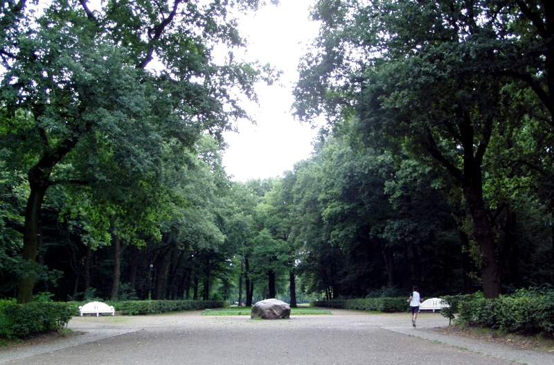 Volkspark